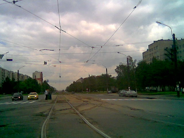 Dybenko street in Saint-Petersburg, Russia.